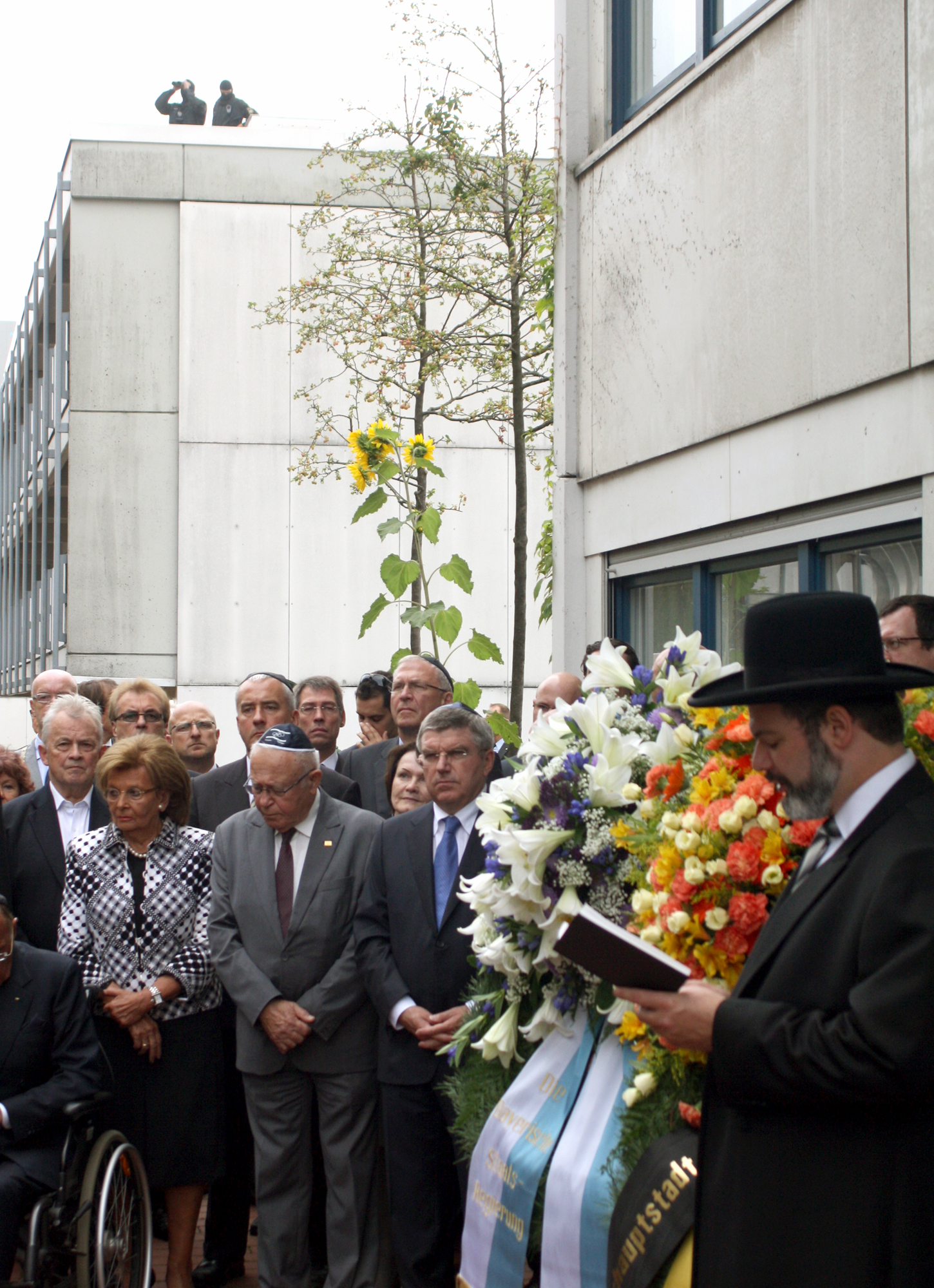 Gedenkfeier mit Kranzniederlegung im Olympischen Dorf am 05.09.2012 unter den Augen der Polizei (SEK). Vor dem Gebäude Connollystraße 31.